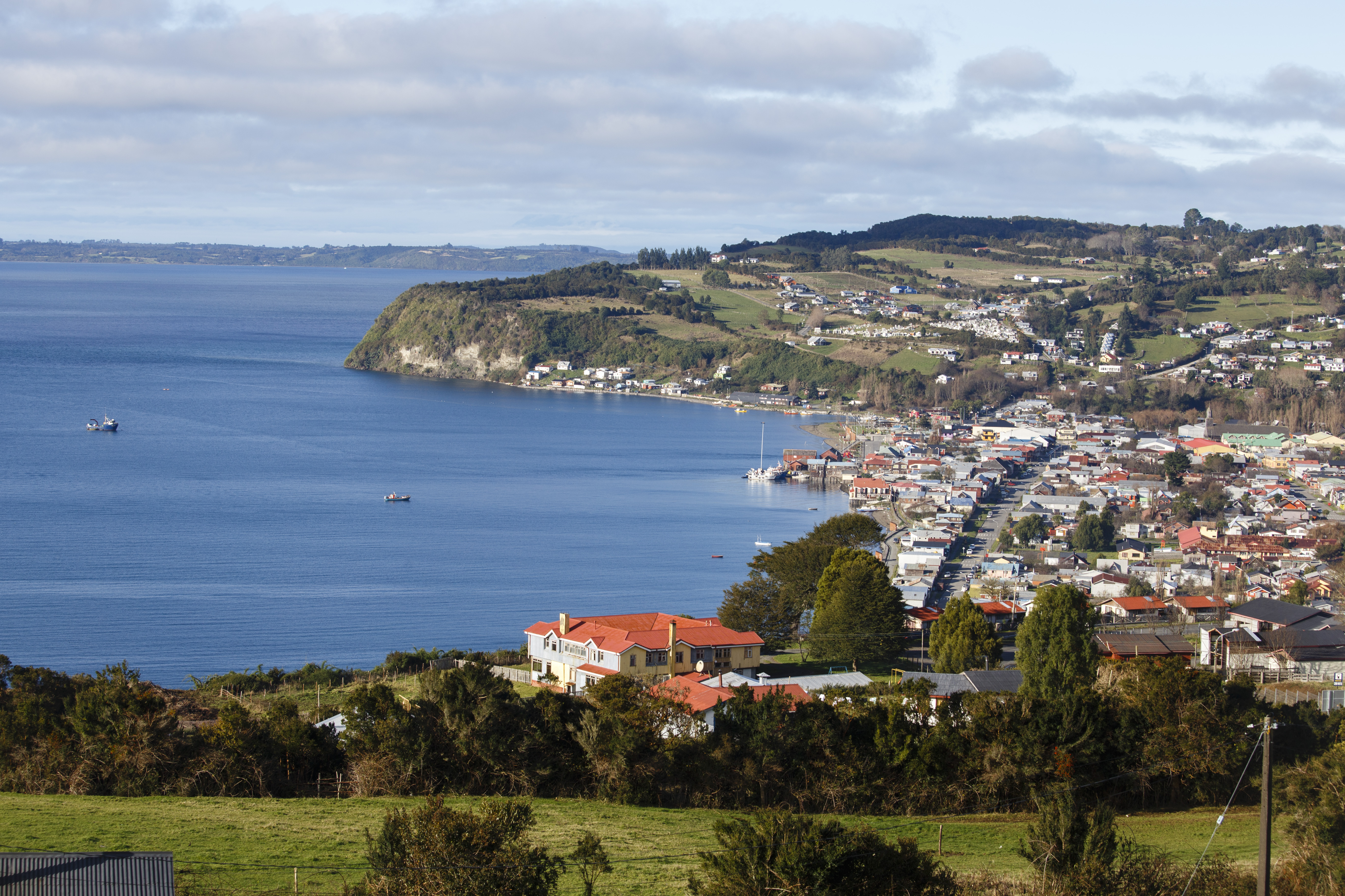 desde mirador alto la paloma